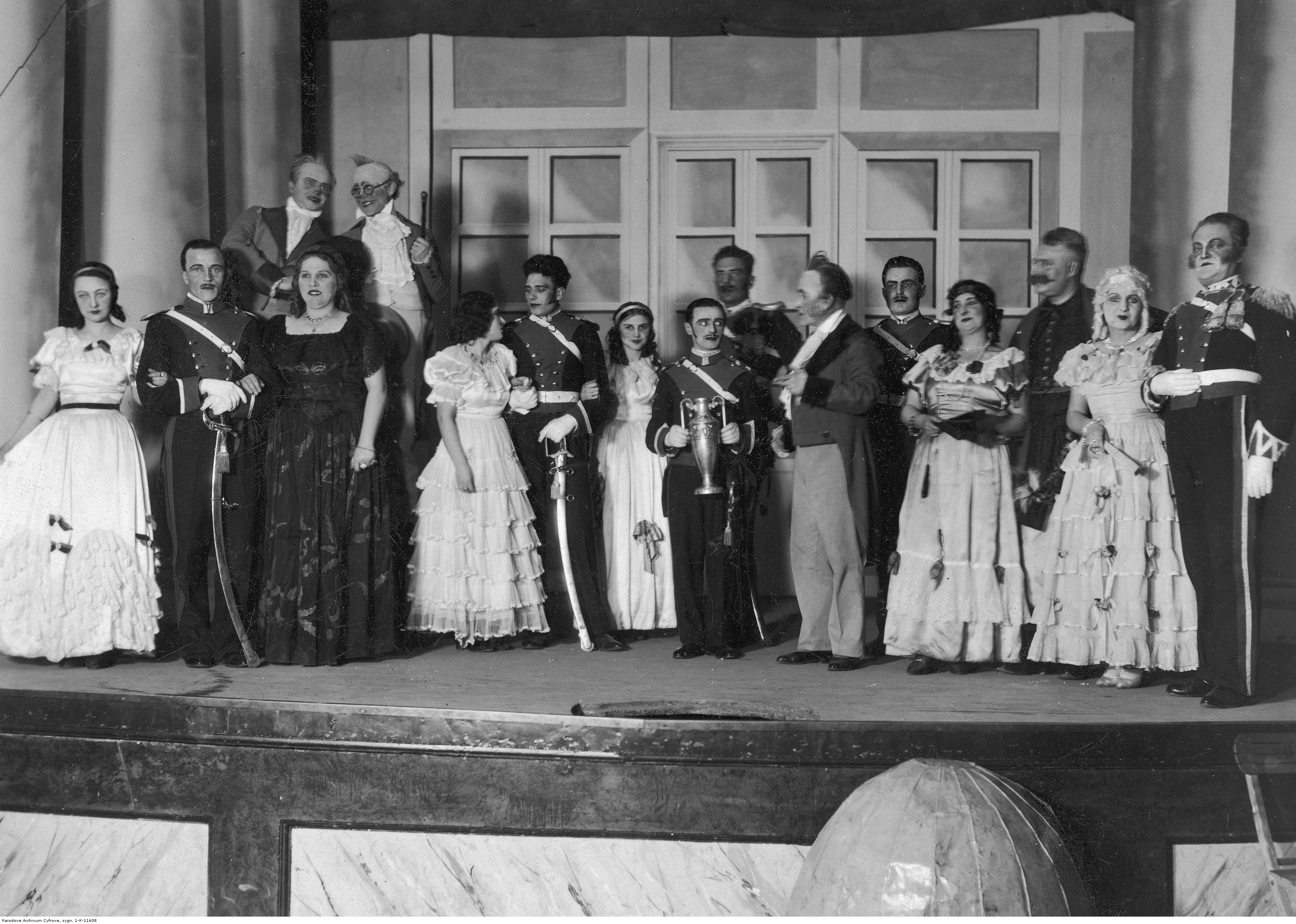 Przedstawienie "Ułani księcia Józefa" w wykonaniu Teatru Żołnierskiego KOP w Czortkowie. Koncern Ilustrowany Kurier Codzienny - Archiwum Ilustracji. Sygnatura: 1-K-11608